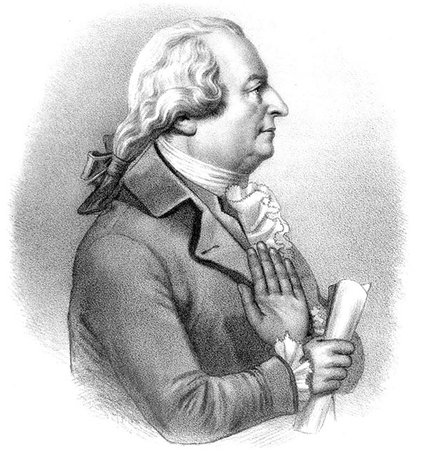 Claes de Frietzky (1727-1803)